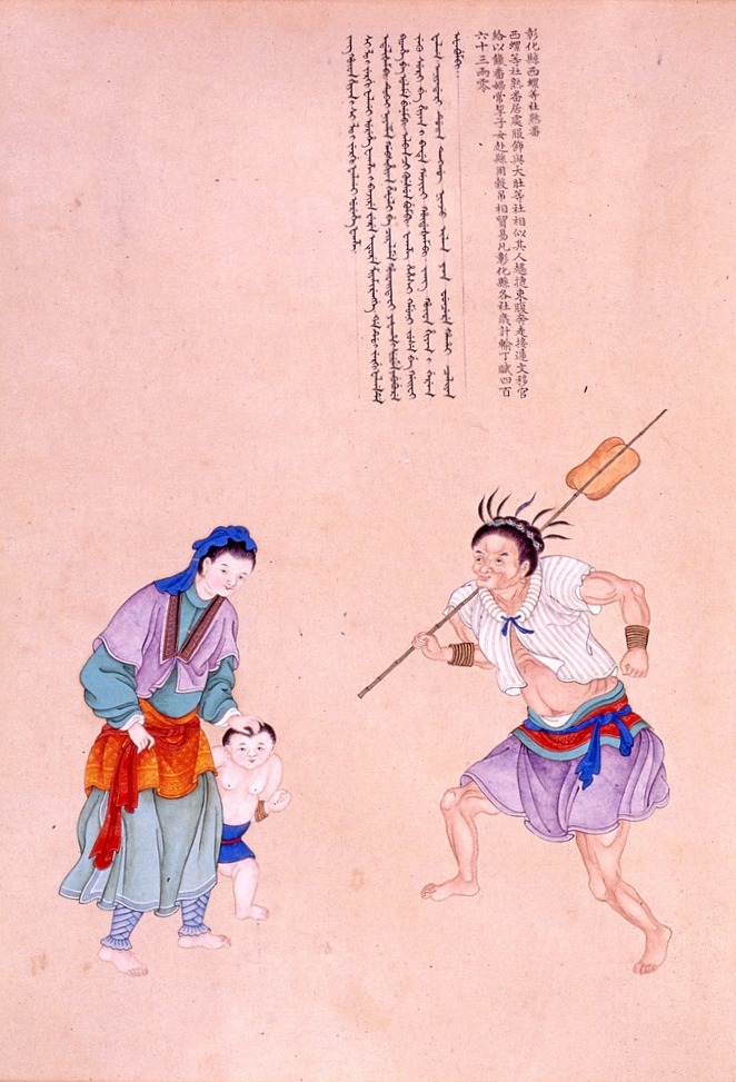 中文（香港）: 清 謝遂 職貢圖